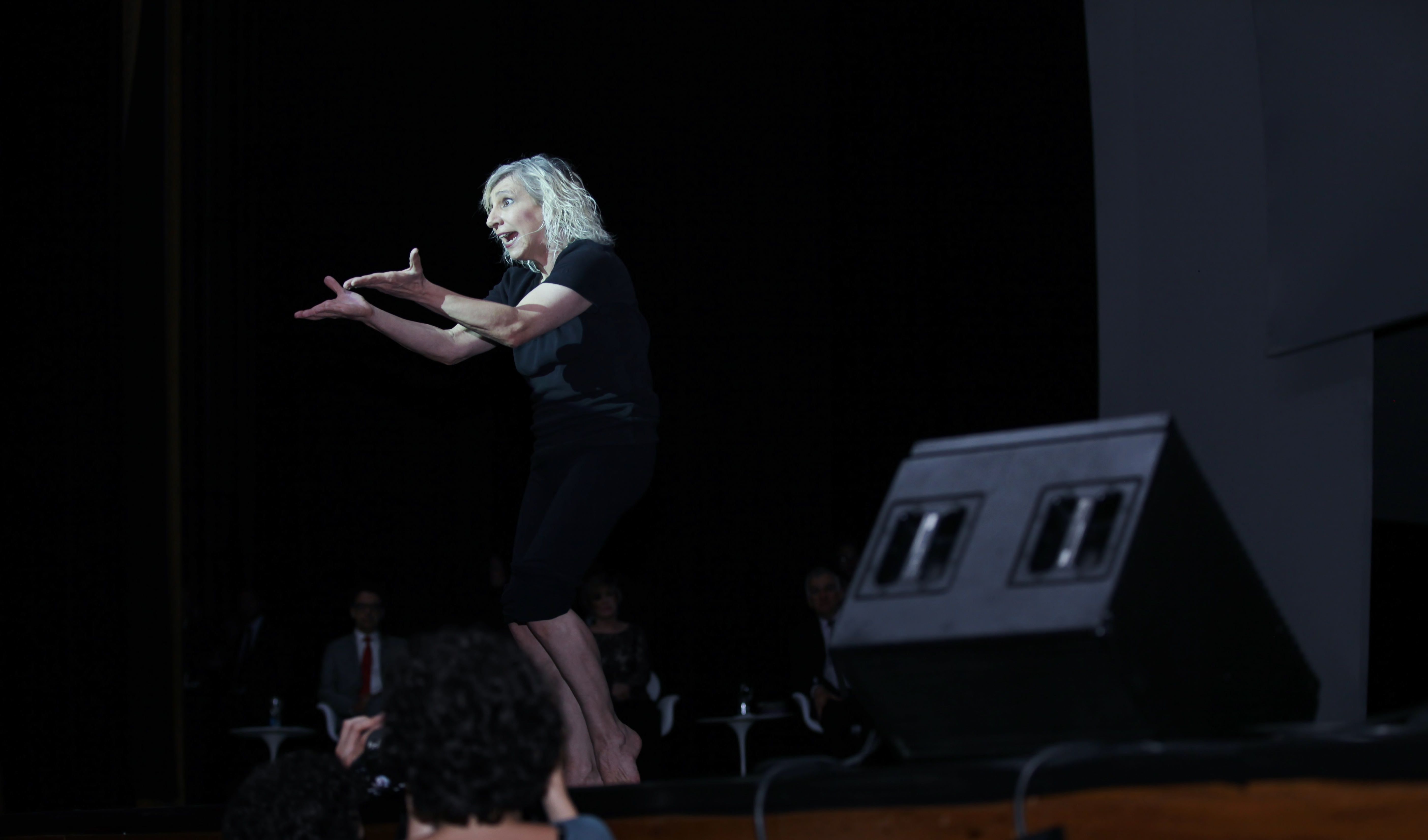 São Paulo (SP) | Ministério da Cultura celebra a Ordem do Mérito Cultural 2013. Na foto: Denise Stoklos. 05.11.2013 Foto: Montserrat Bevilaqua